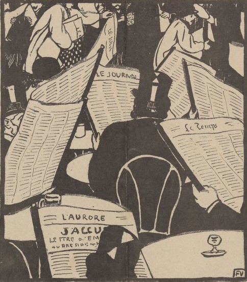 L'âge du papier de Félix Valotton, Le cri de Paris, 23 janvier 1898.